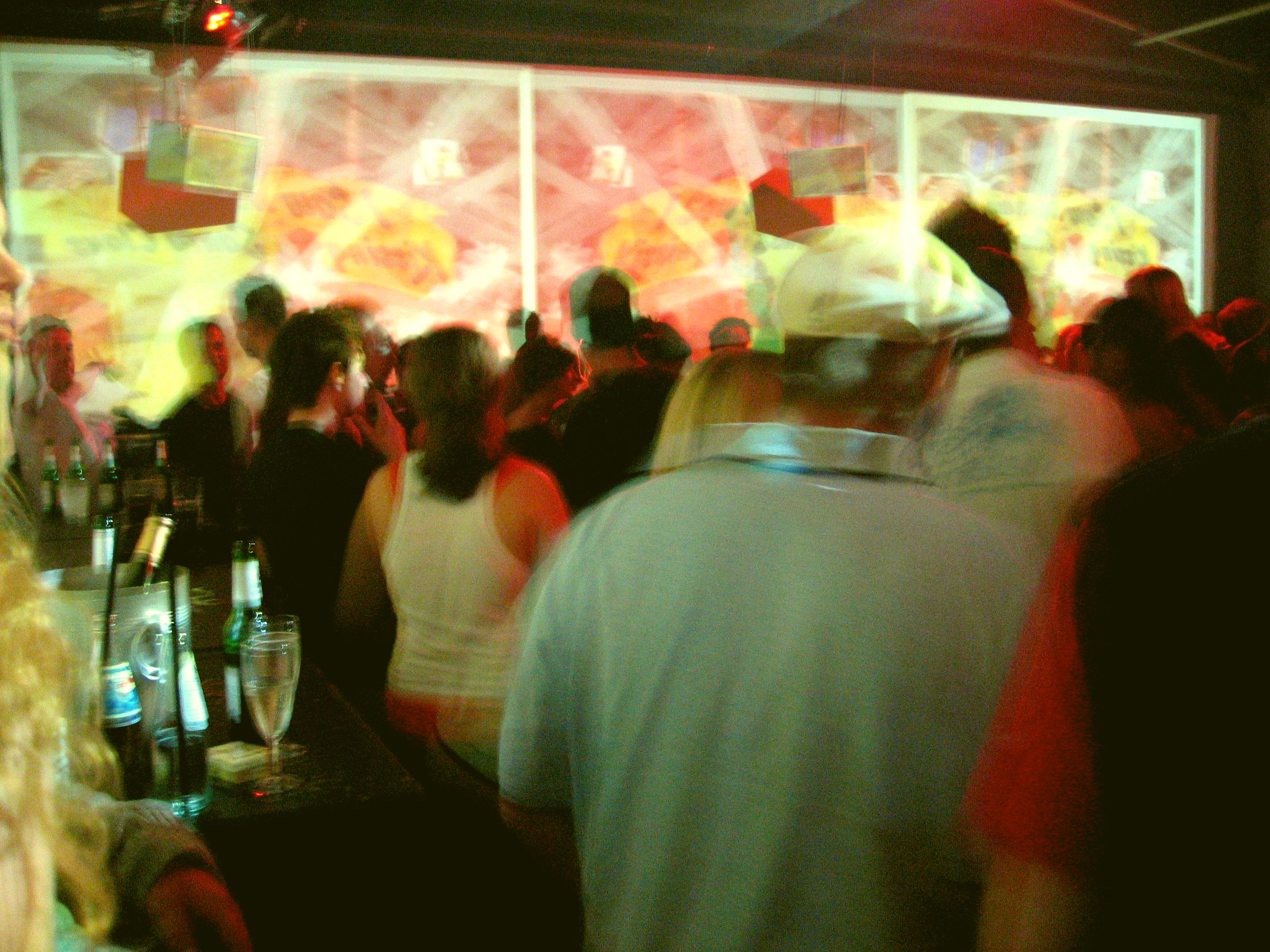 Visuals im Harry Klein Club, München